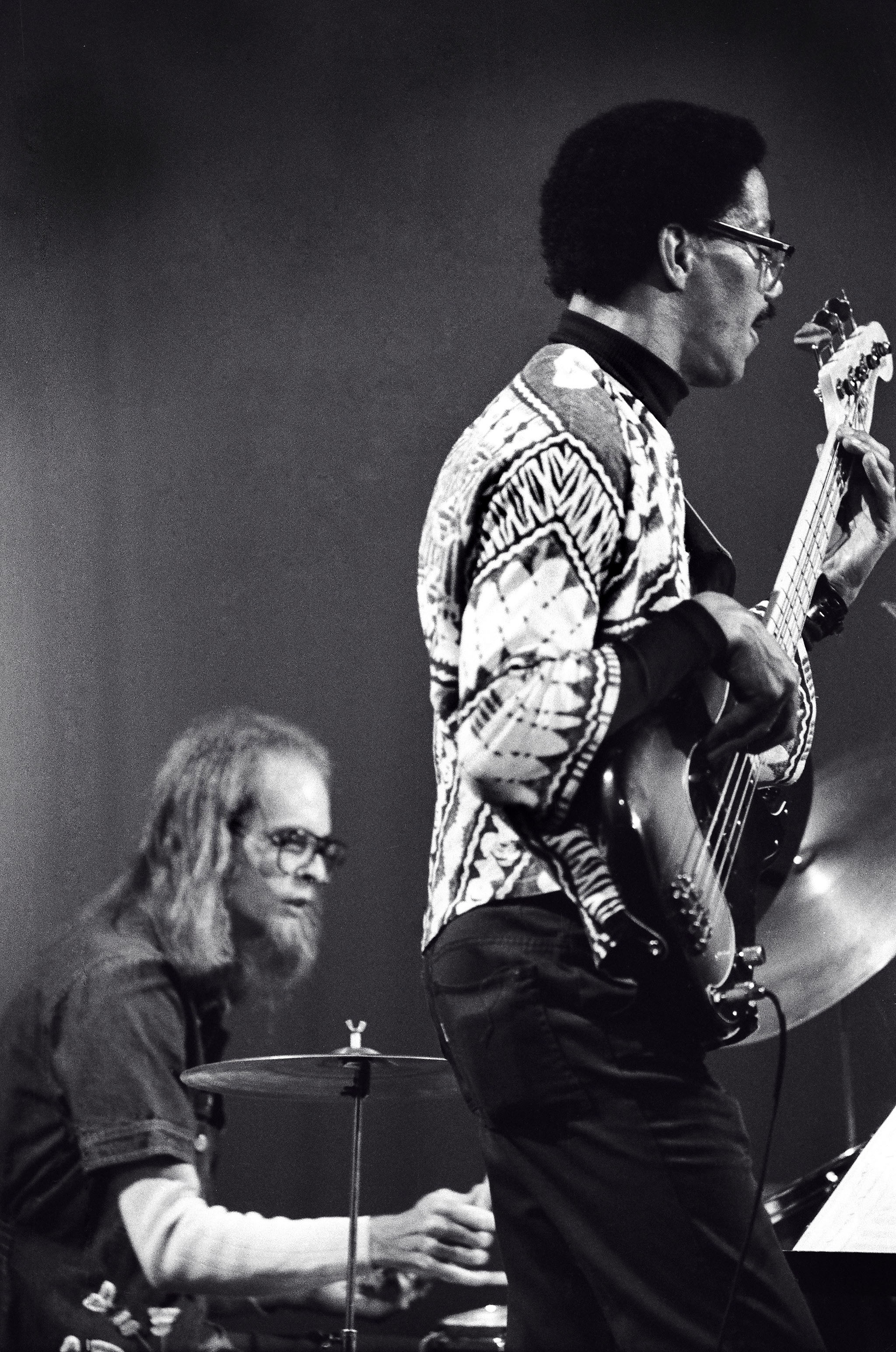 Rochester, N.Y. 1976